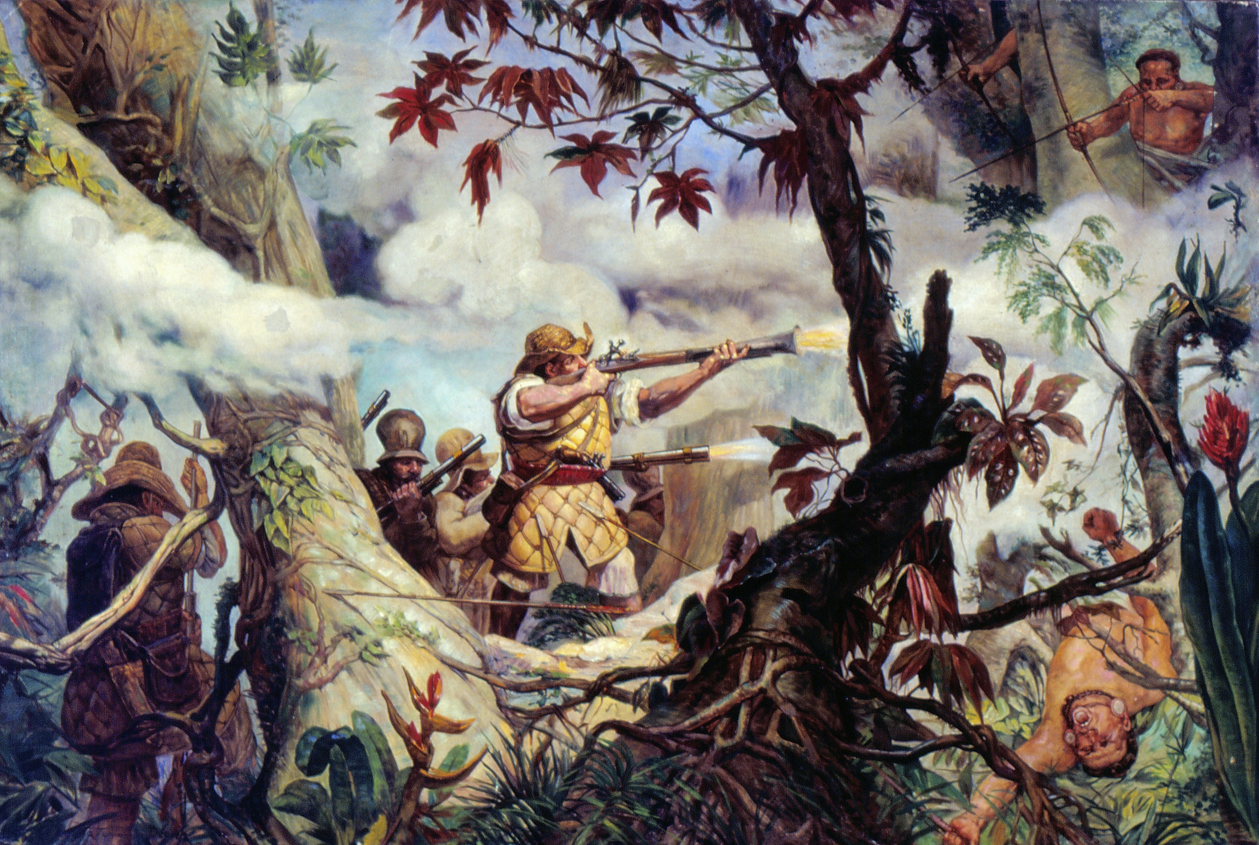 Obra que integra o acervo do Museu Paulista da USP. Coleção Fundo Museu Paulista - FMP